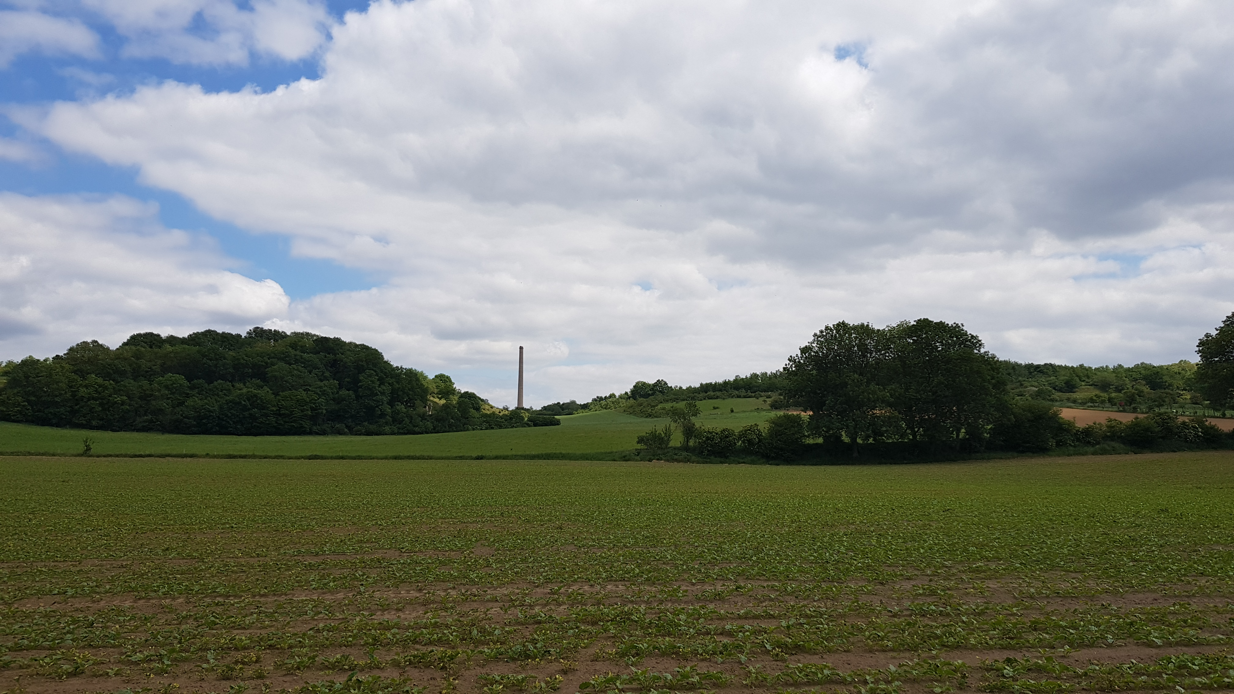 Poppelmondedal (Nederland) gezien vanuit Kanne (België)